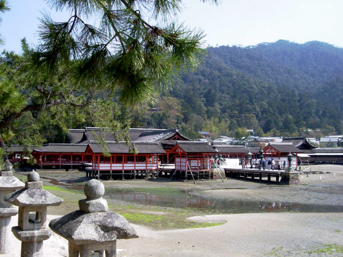 Itukusimajinja sea side(厳島神社),Hiroshima Miyazima